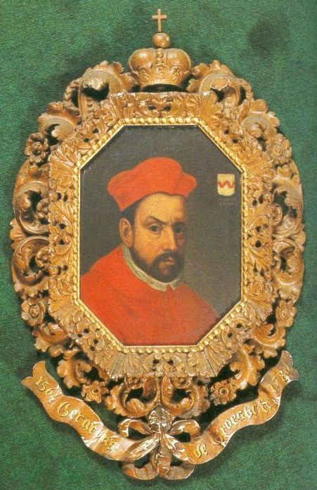 Prins-bisschop Gerard van Groesbeek (1517-1580), olieverfportret (collectie Bisdom Luik)